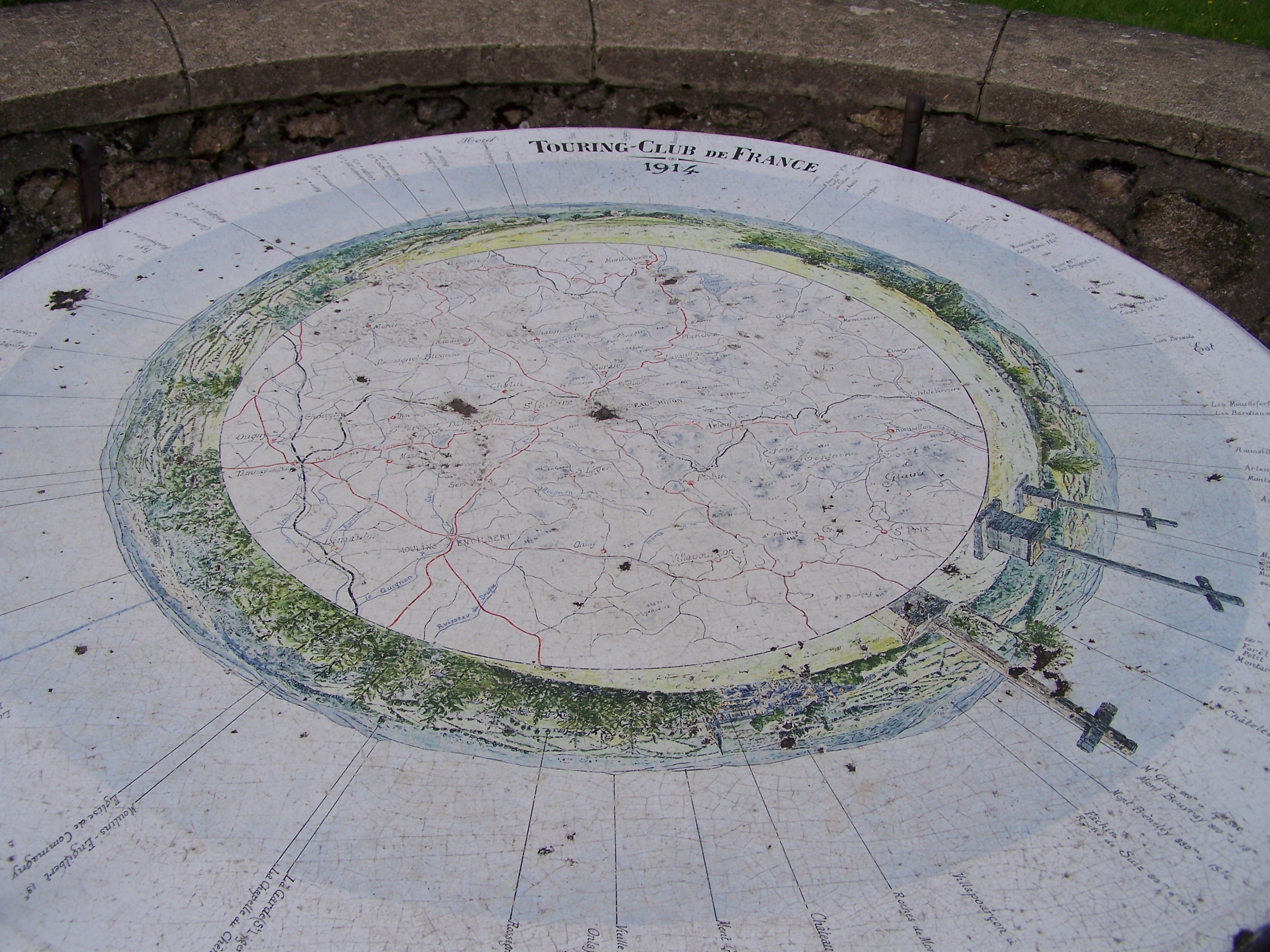 Table d'orientation de 1914 offerte par le Touring club de France et située au faîte du Calvaire de à Château-Chinon (Ville).